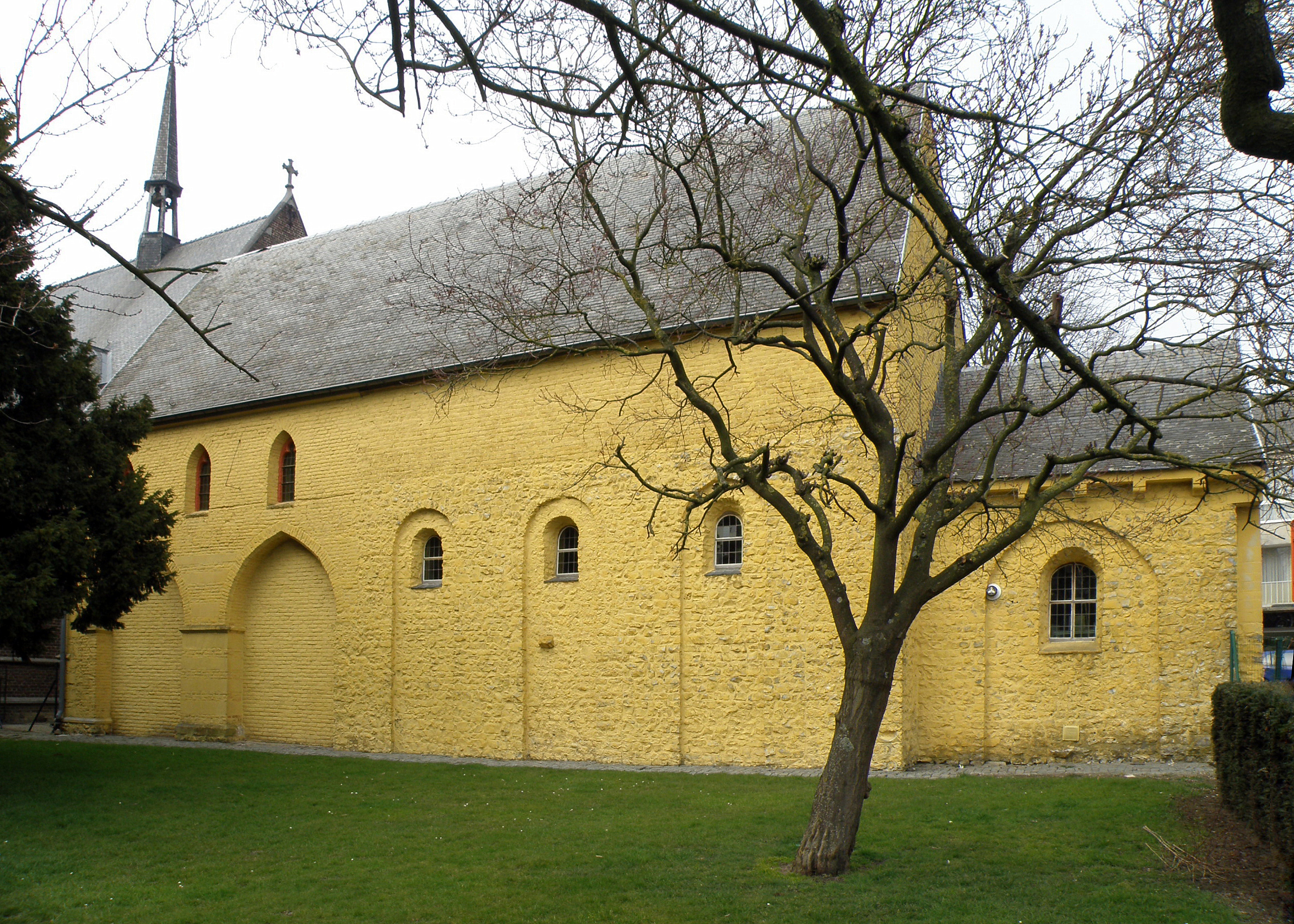 Looz (en néerl. Borgloon), prov. de Limbourg, Belgique. Anc. Chapelle du béguinage, dite aussi Chapelle de Graethem, sise Graethempoort. Façade sud.